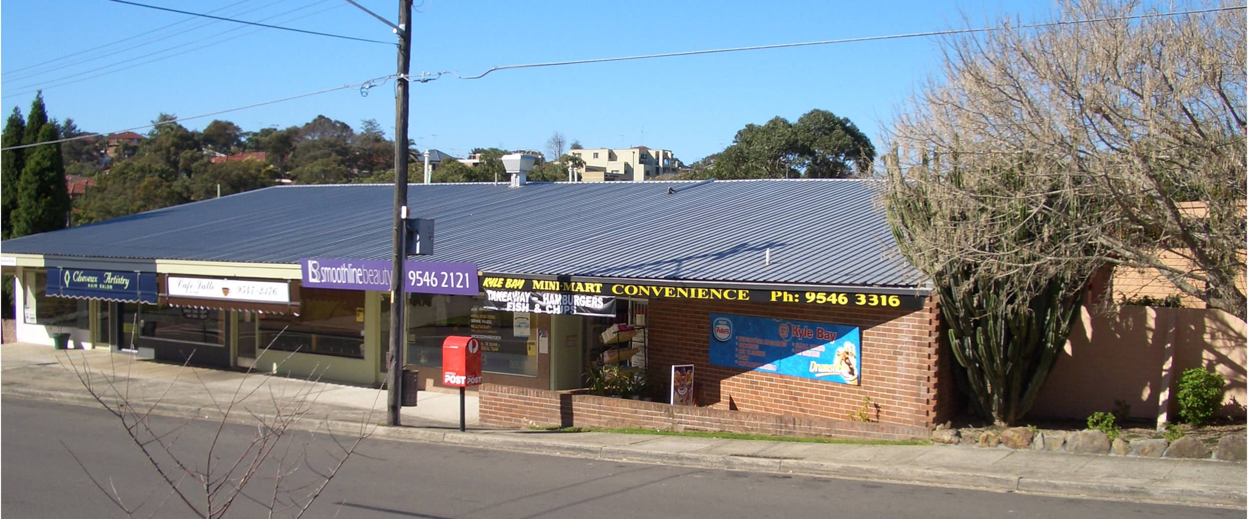 Kyle Bay, Sydney